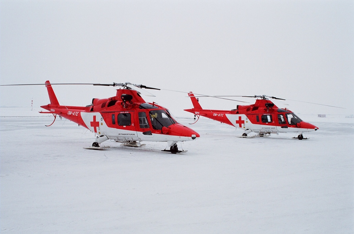 Agusta A109K2